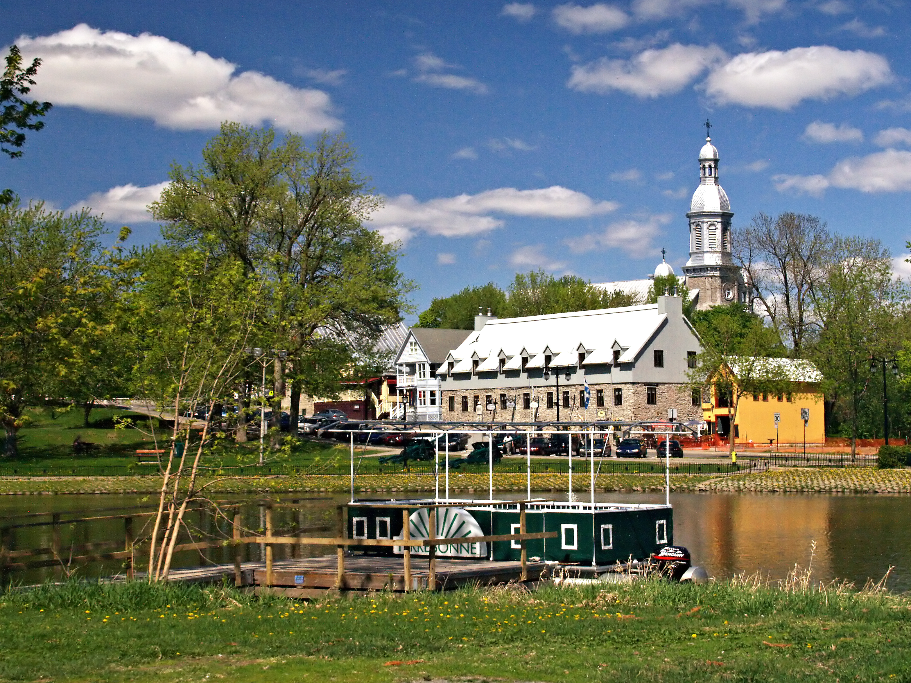 Terrebonne (Québec) - L'écluse des Moulins et l'église St-Louis-de-France